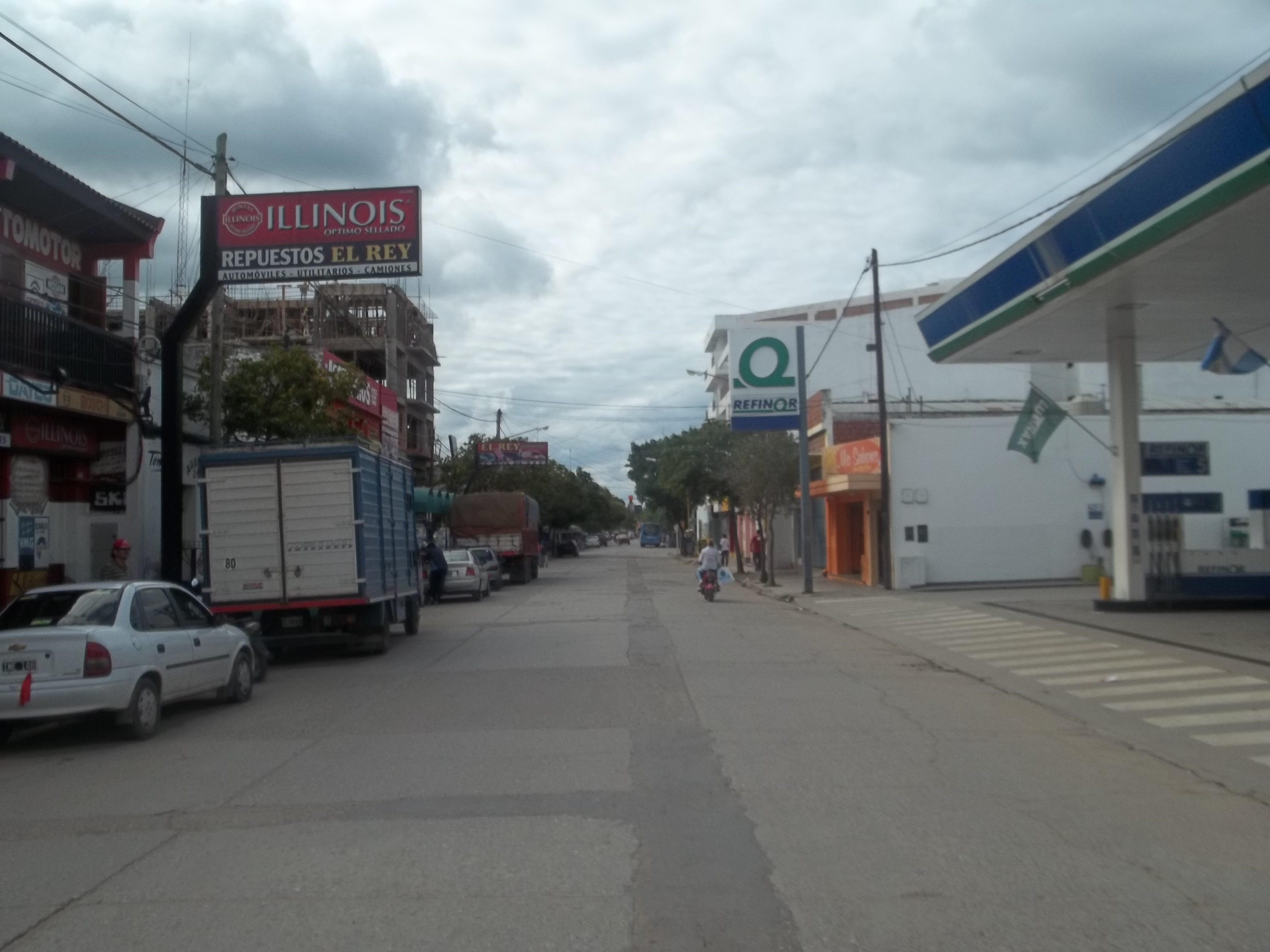 Vista de la calle Pellegrini (calle principal de San Ramón de la Nueva Orán, Salta, Argentina) al norte en su intersección con calle España.